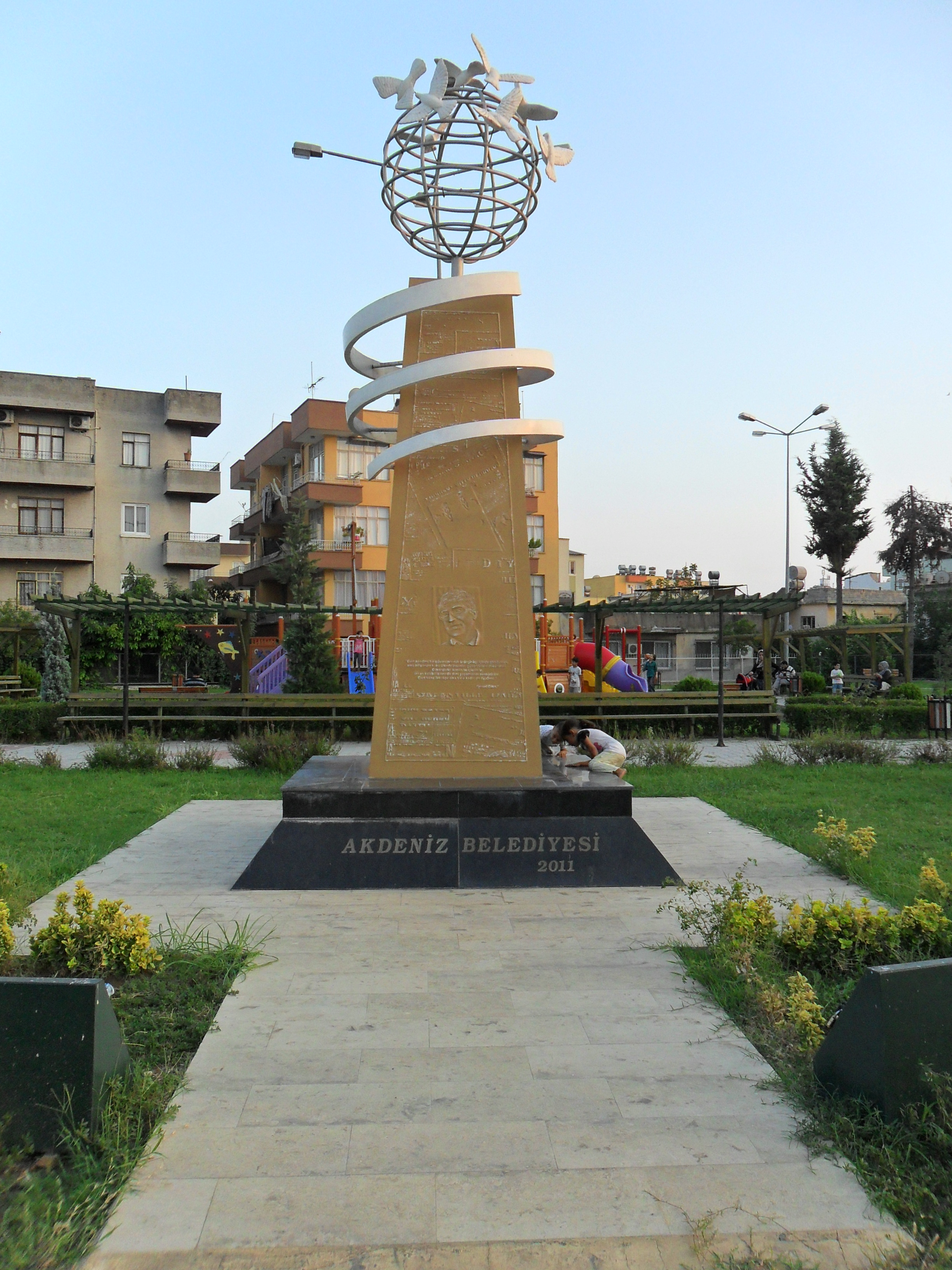 Mersin'deki Hrant Dink Parkı'nda yer alan anıt.